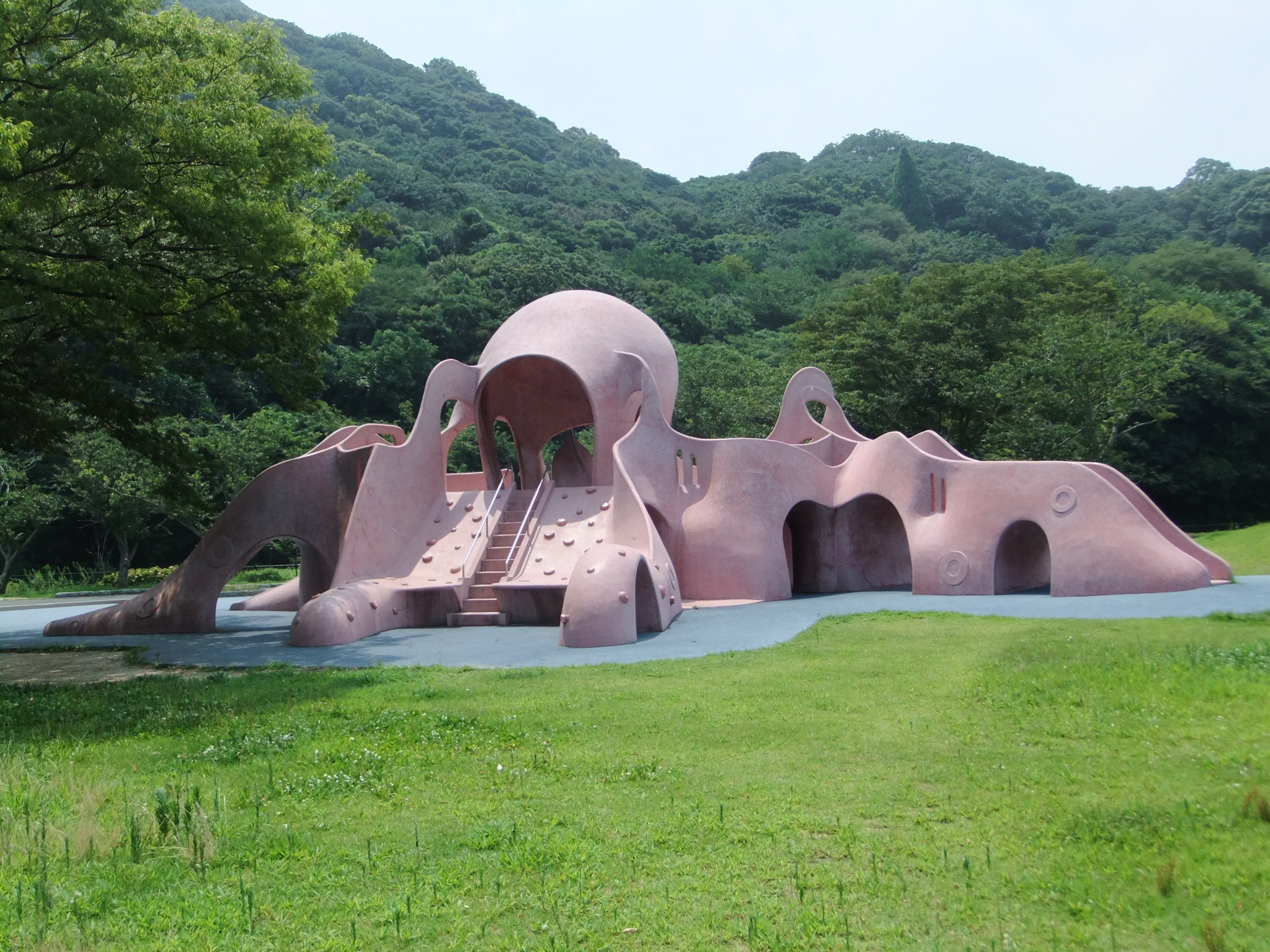 和布刈公園の「タコの山」